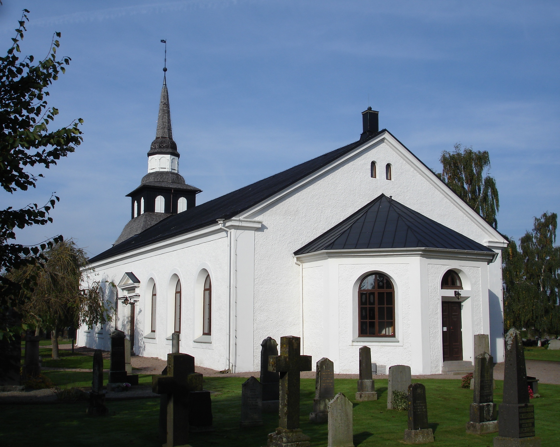 Ränneslövs kyrka i Södra Halland